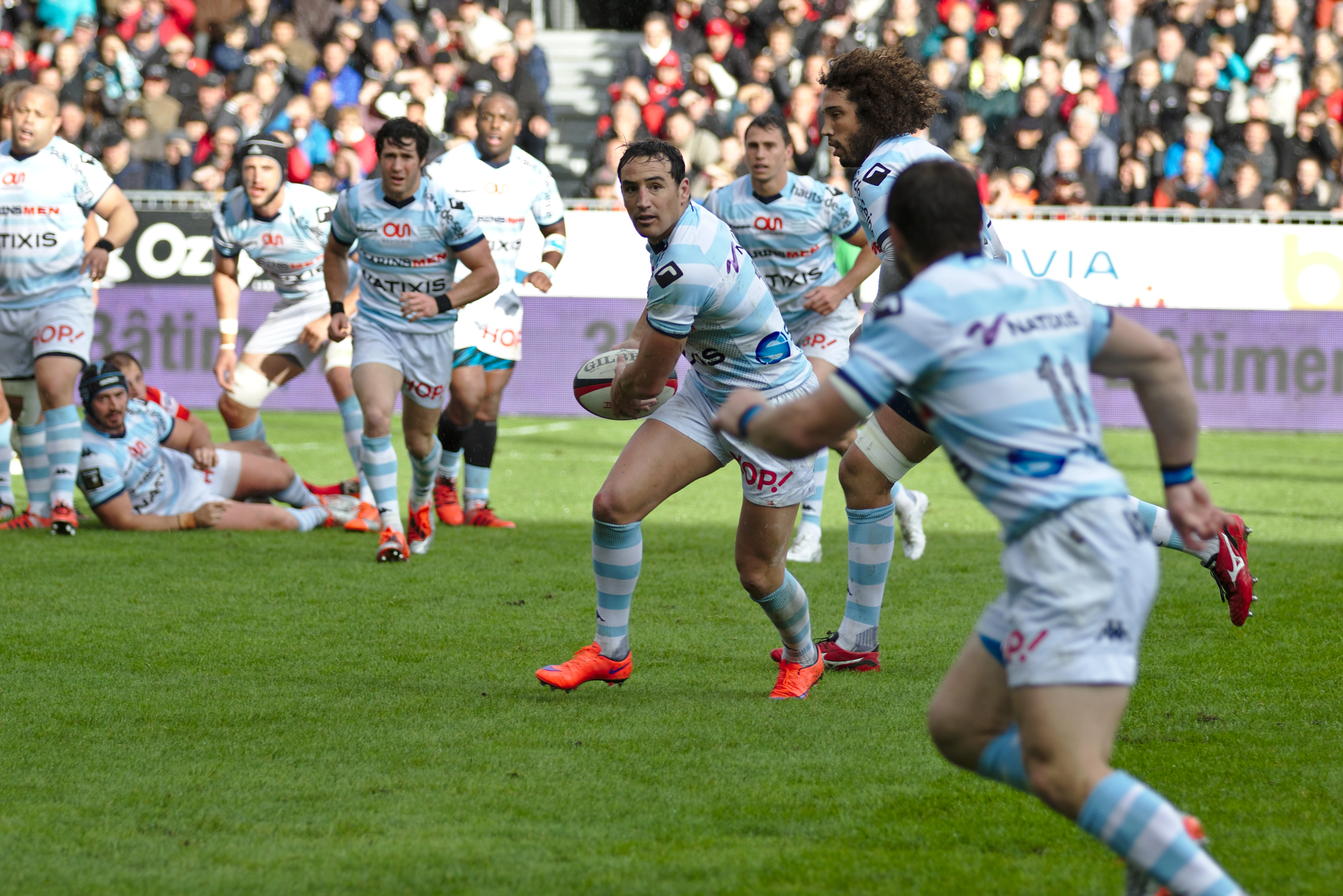 USO - RM92 - 20150425